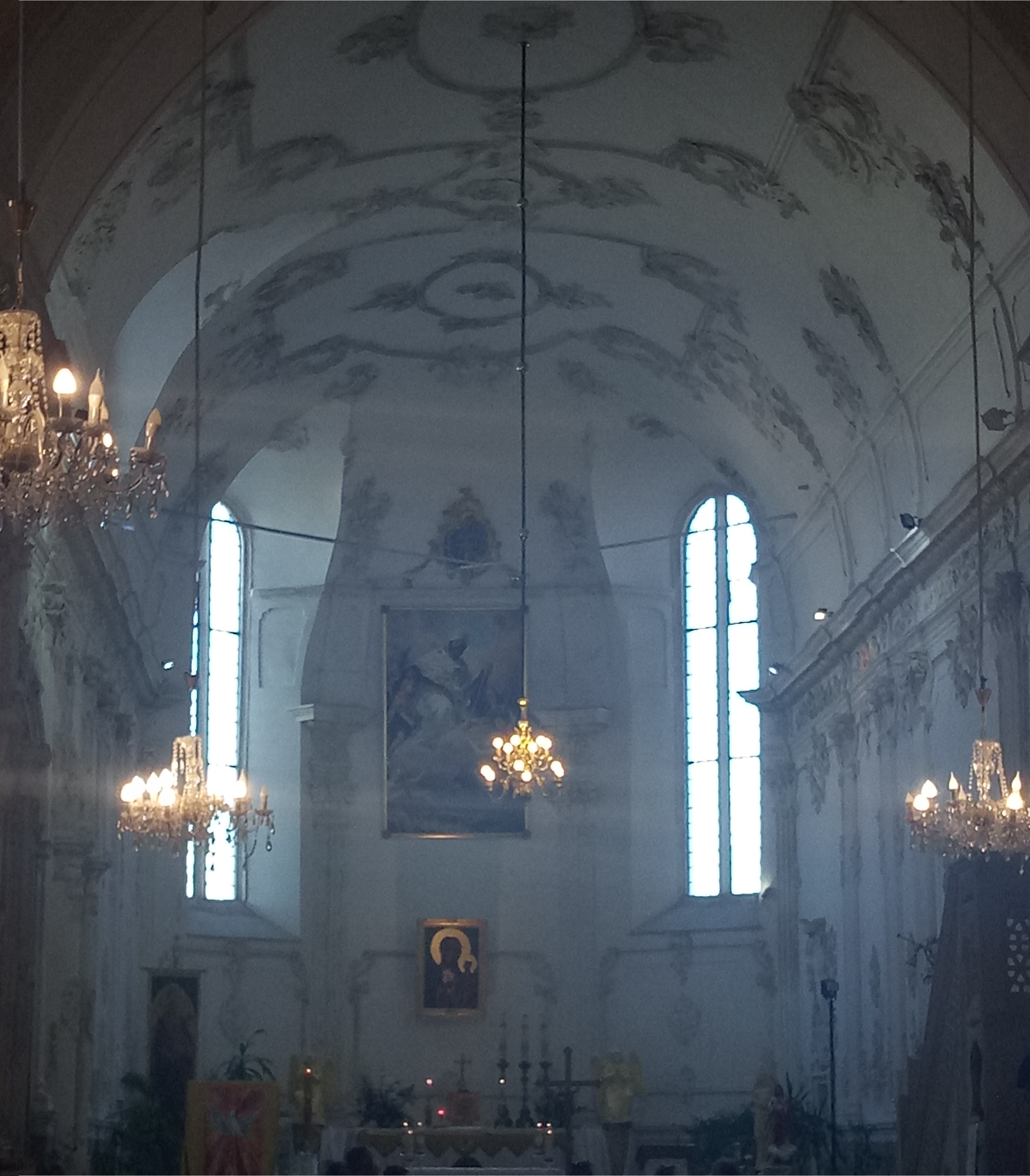 фотографія